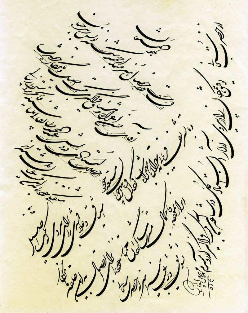 خط استاد عطارچیان به شیوه درویش عبدالمجید متن نوشته: « هوالمستعان دوست ستوده‌خصال هنرمند ارجمند شکسته‌نویس زبده جناب آقای حسن اعرابی که مشتاق فراگیری مکتب اصیل و ماندگار حضرت استادی درویش عبدالمجید طالقانی می‌باشند و با تحریر دستخط زیبایی شیفتگی خود را به این مکتب عیان داشته‌اند و با تشریف‌فرمایی به تهران به همراه شاگردان و هنرجویان مستعد خود اشتیاق و علاقمندی را برای پیروی از مکتب اصیل ابراز نموده و با کمال مسرت شاگردان ممتاز خود را برای اتصال به این حلقه ماندگار تشویق و ترغیب می‌نمایند از حضرت سبحانی توفیق همگان را در پیروی از آثار آن استاد کل و اشاعه آن مکتب فراگیر آرزومندم محمدحسین عطارچیان ۵۶۴ »